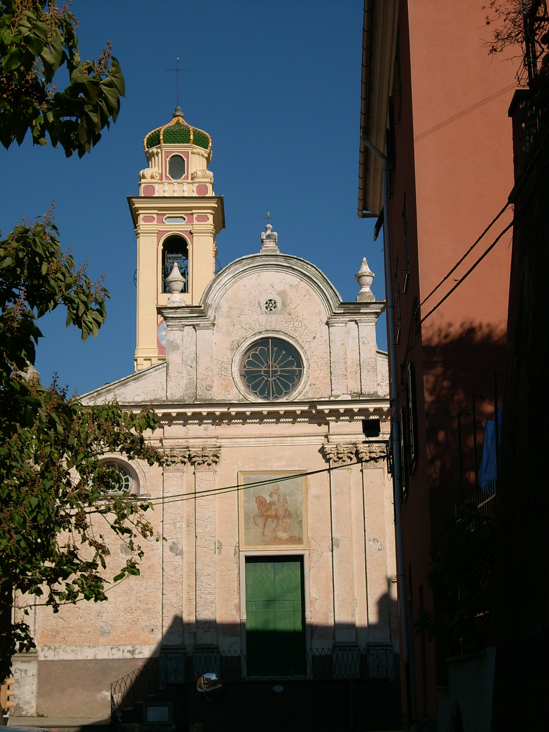 Chiesa di San Martino presso Stella San Martino, Liguria, Italia